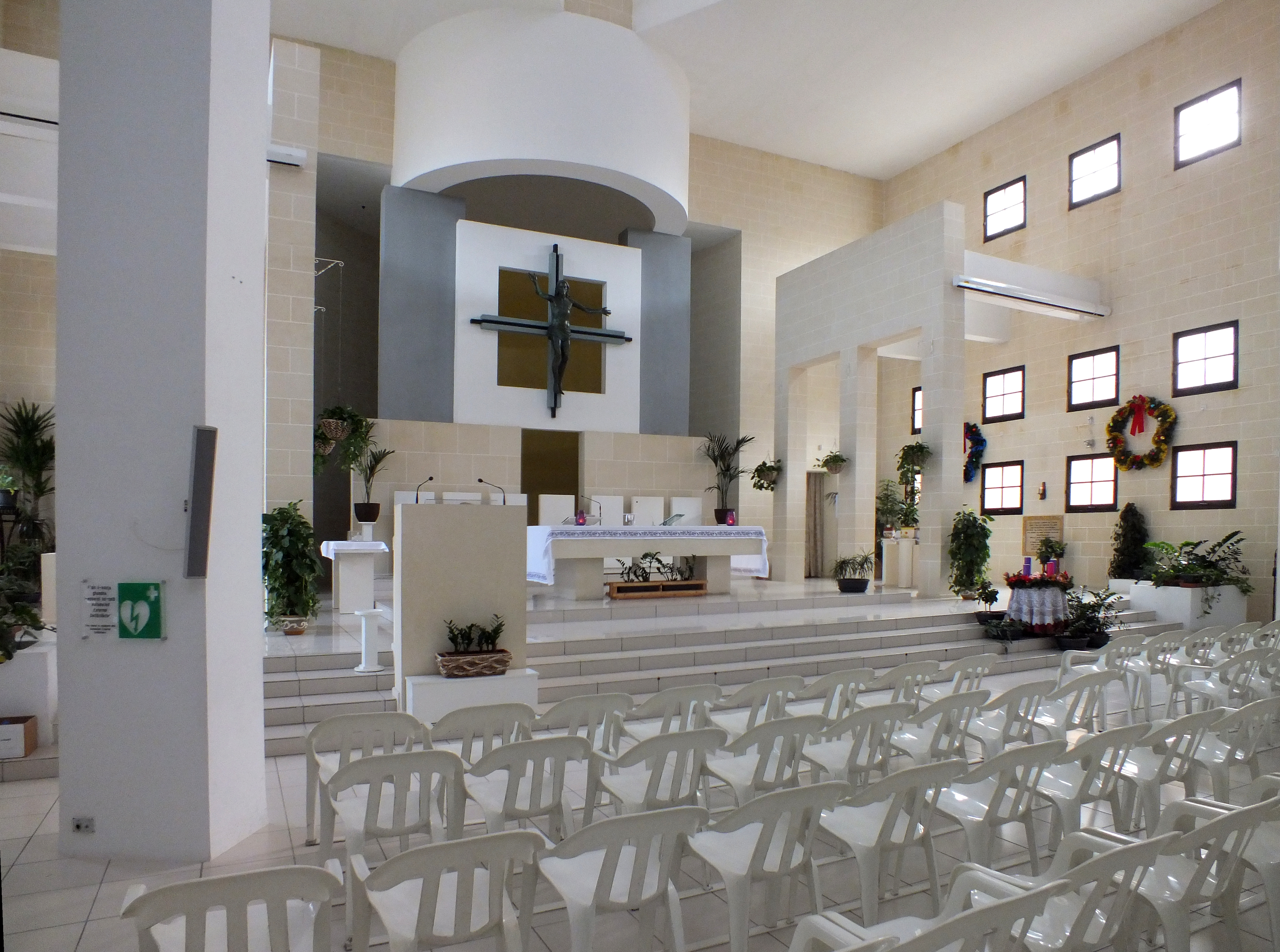 Malta, St. Franziskus-Kirche (Church of St Francis of Assisi), Ortsteil Qawra von St Pauls bay